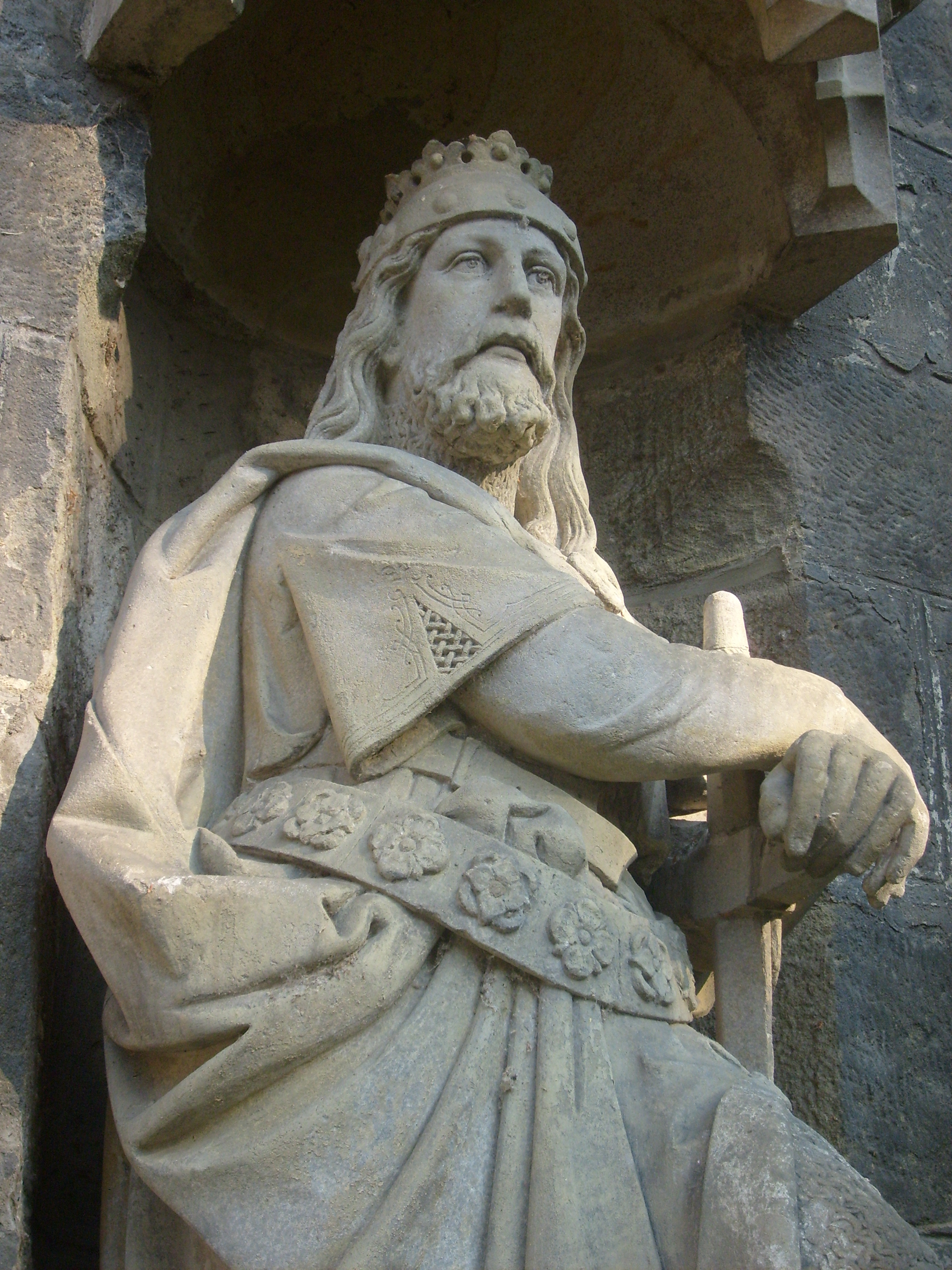 Socha Břetislava I. na Žižkově náměstí, Chrudim, Pardubice Region, Czech Republic